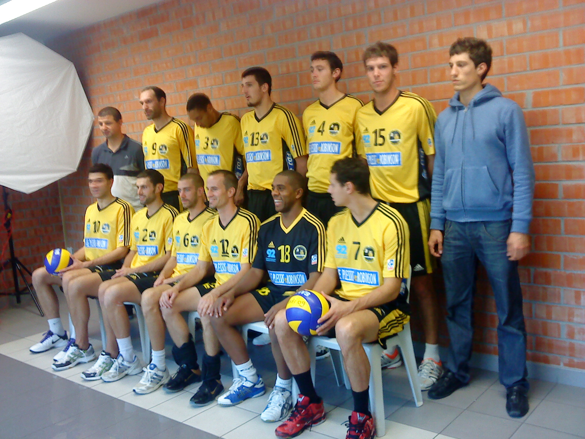 L'équipe de Plessis-Robinson Volley-ball pour la saison 2010-2011